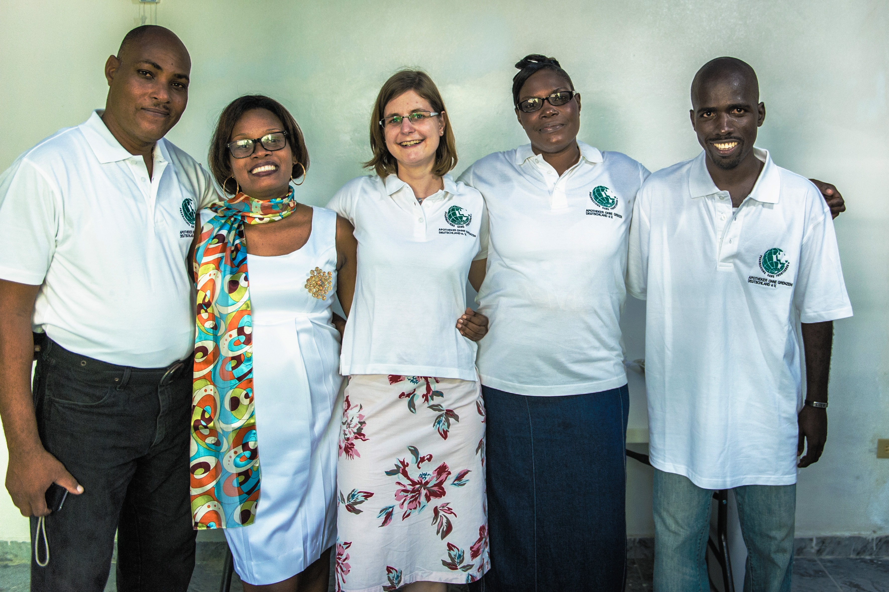 AoG Team in Haiti. In der Mitte: Dr. Petra Lange.